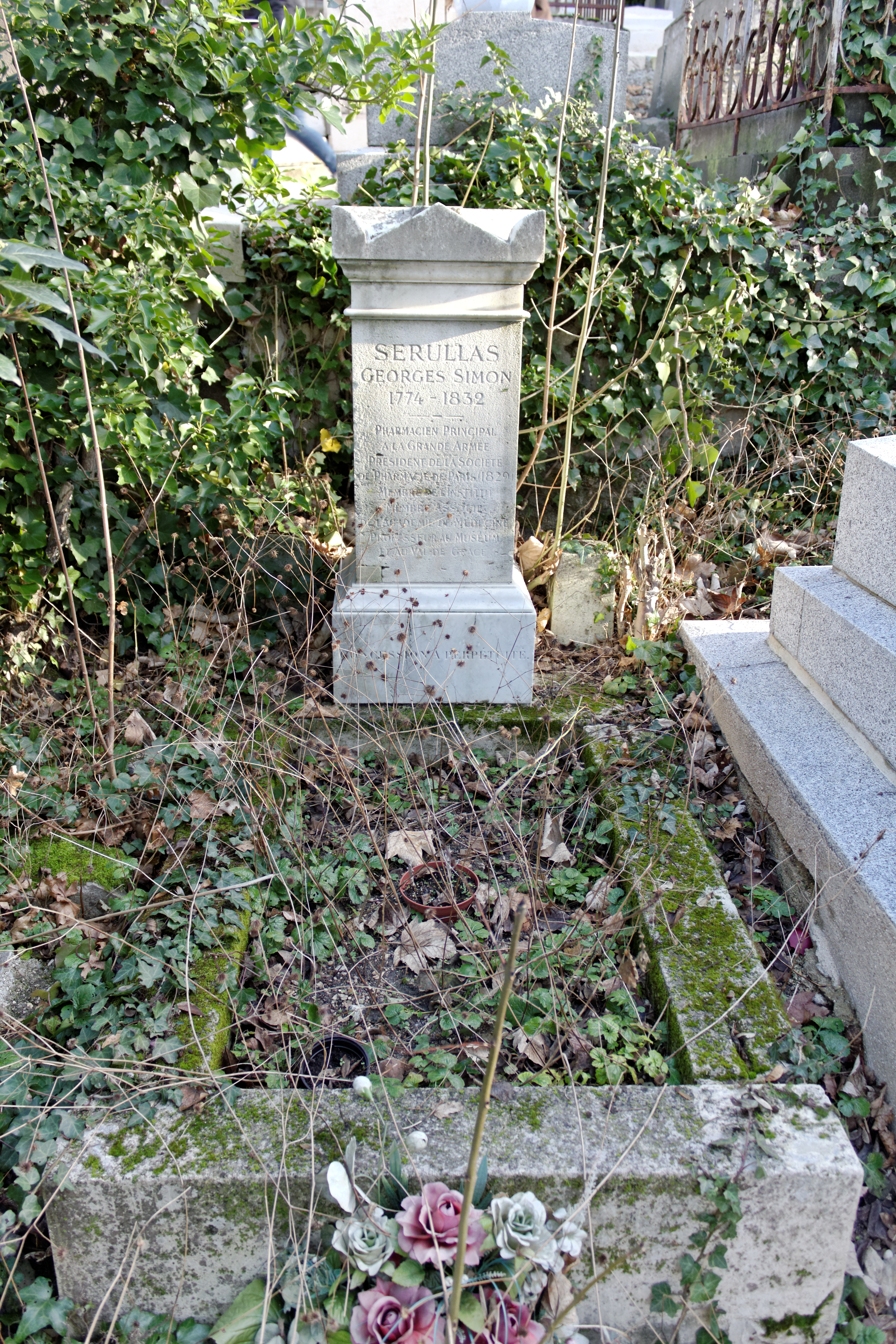 Vue d'ensemble